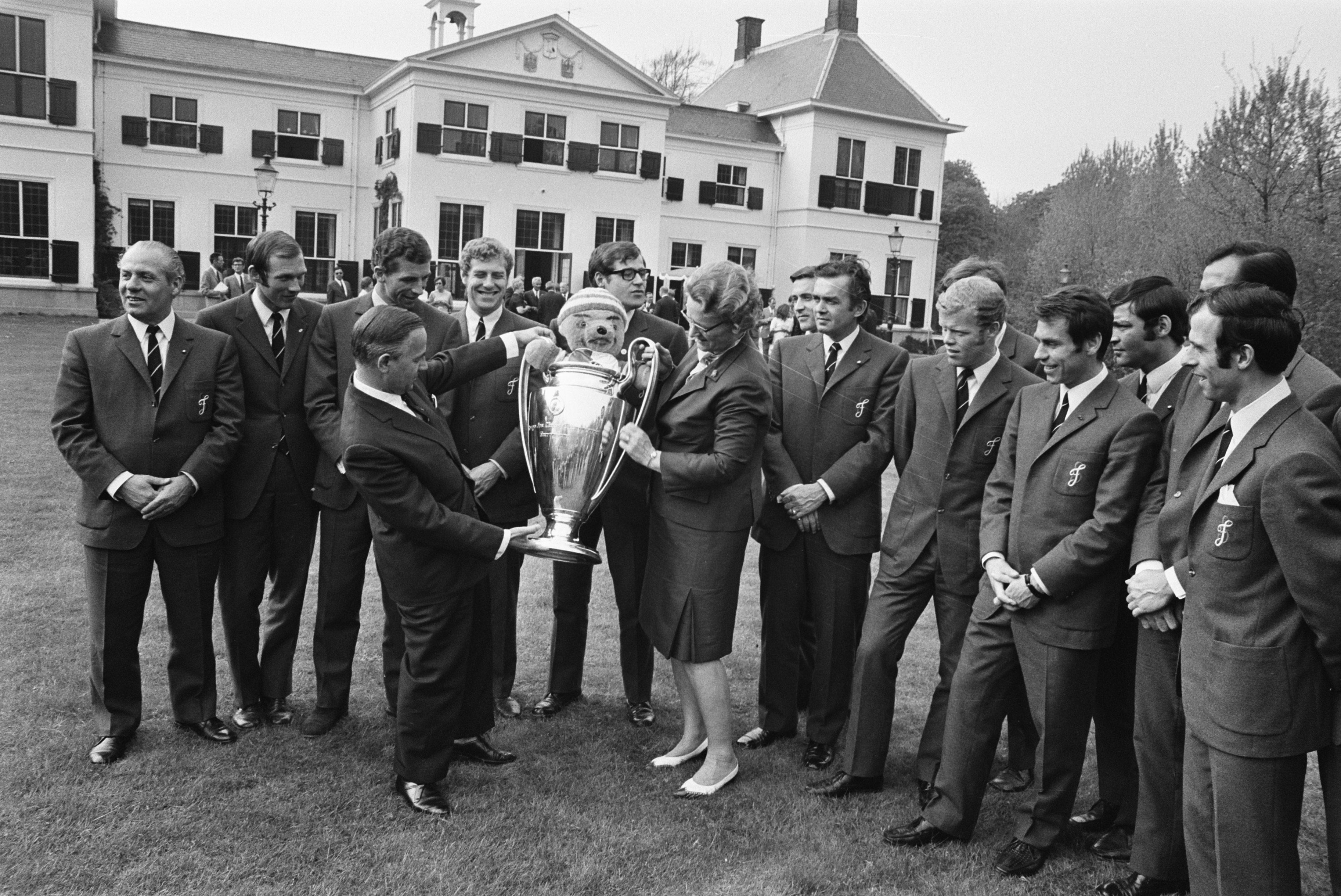 Premier De Jong bewondert te midden van de spelers van Feyenoord de beker van de Europacup die Feyenoord in 1970 won. Foto: Nationaal Archief